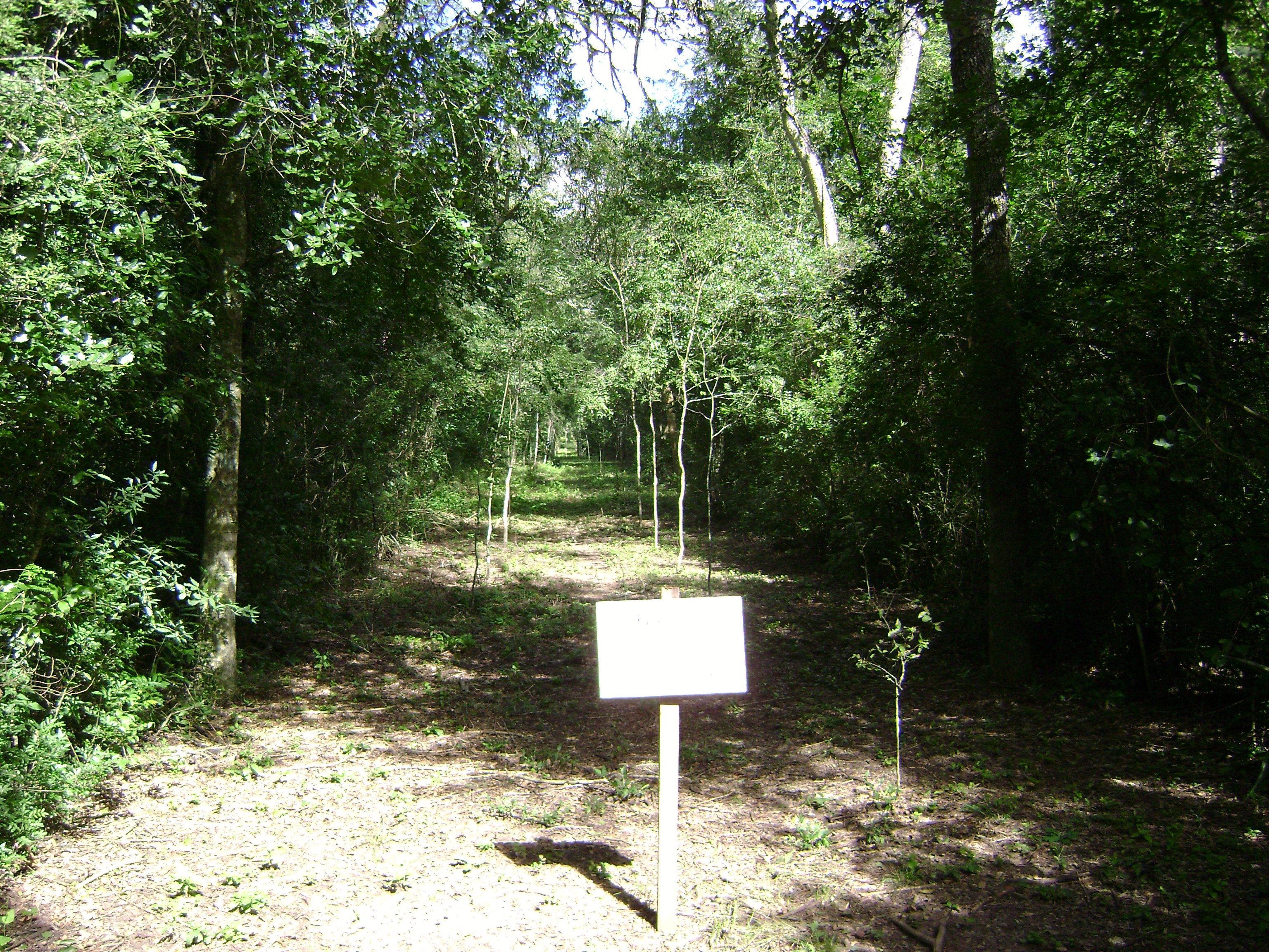 Enriquecimiento con nativas en el parque chaqueño